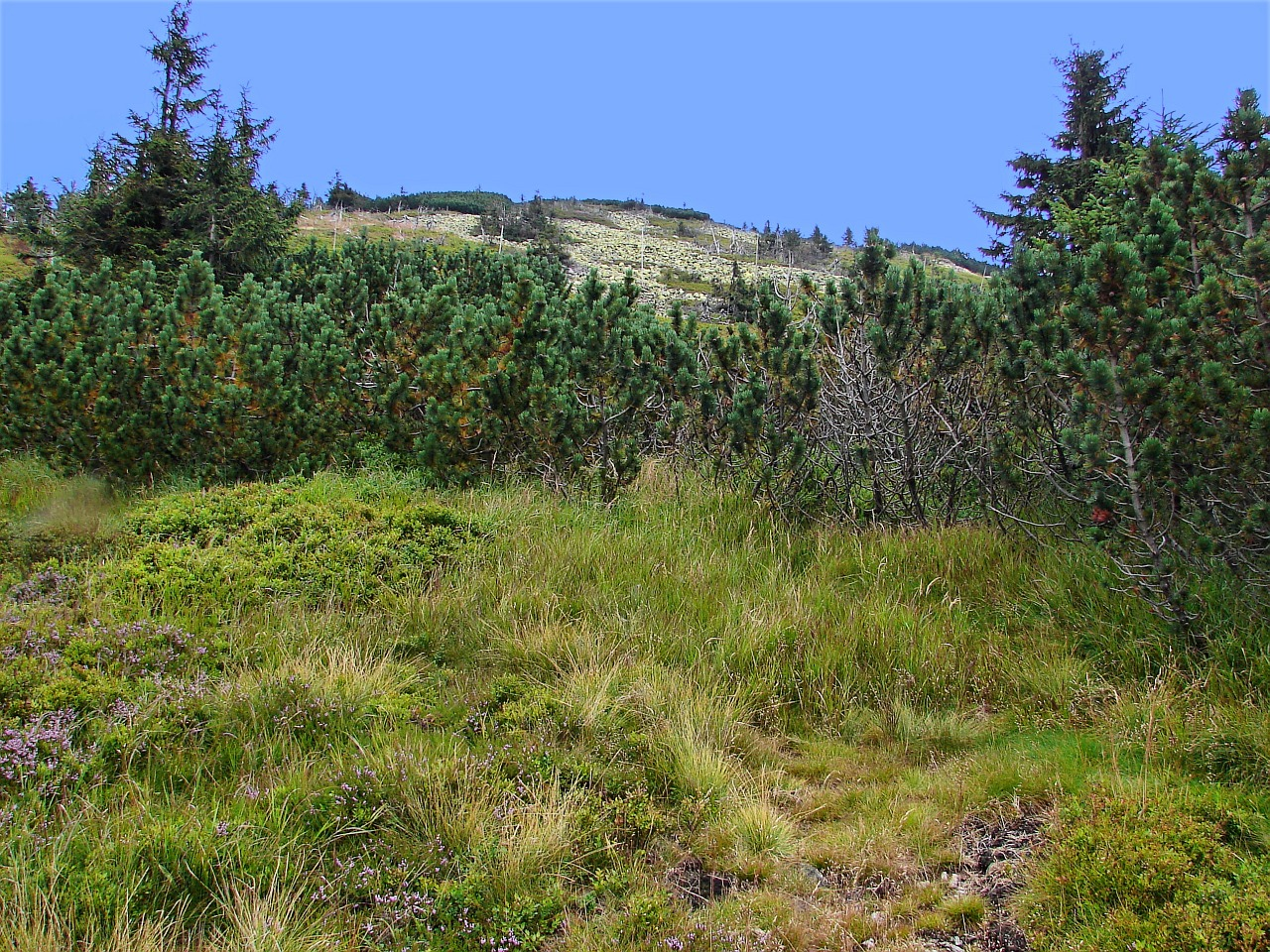 Nepřístupný vrchol Lysé hory z horního okraje sjezdovky.